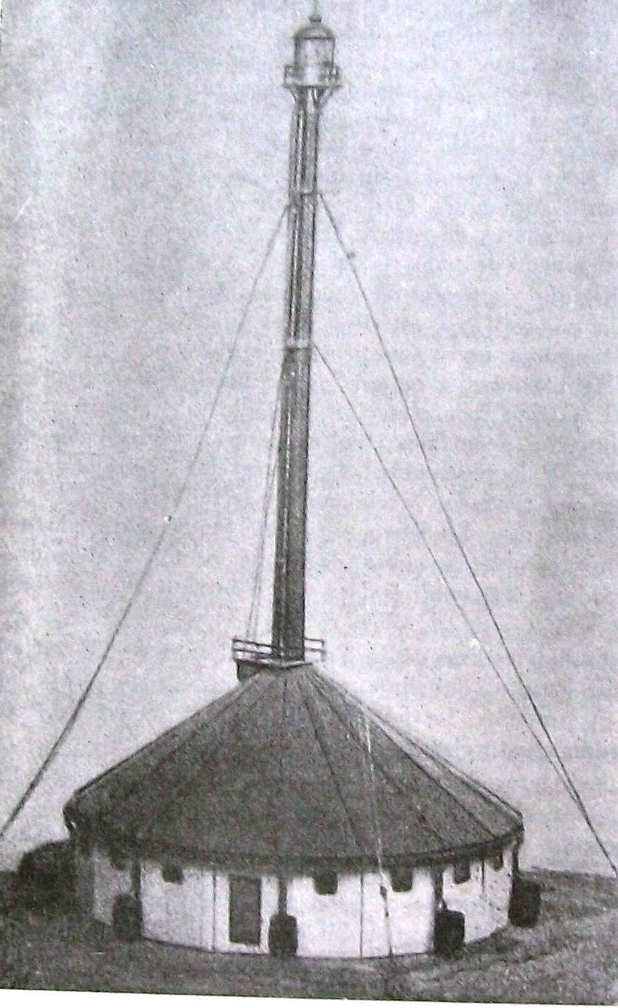 Faro San Juan de Salvamento en la Isla de los Estados, 1884-1902, establecido por el comodoro Lasserre para protección de los náufragos